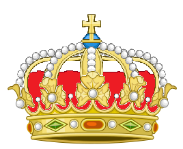 Corona moderna utilizzata dai granduchi dei granducati componenti formalmente l'area dell'ex Sacro Romano Impero e soggetti formalmente ad autorità imperiale anche dopo il 1806